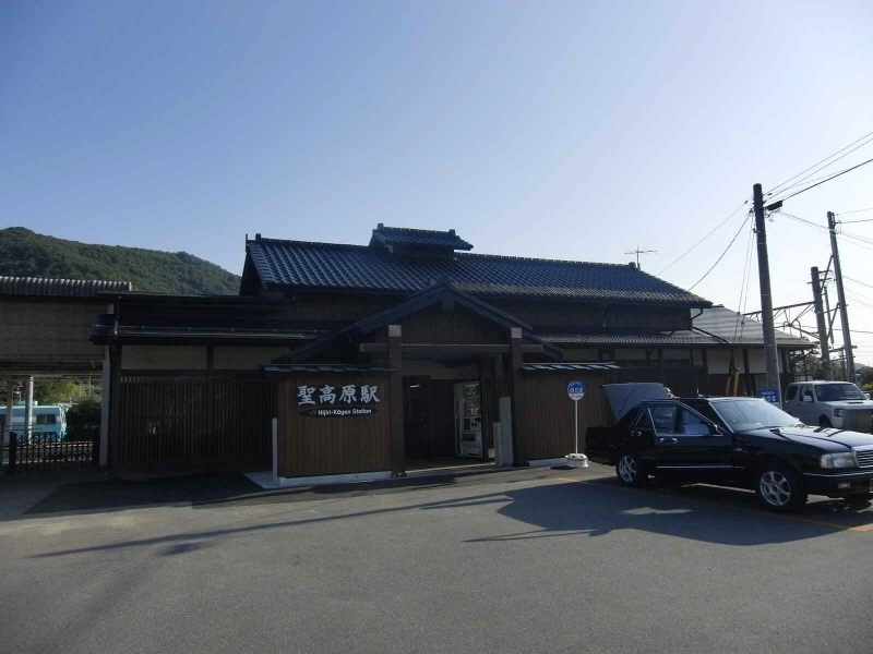 JR東日本篠ノ井線聖高原駅の駅舎の写真です。